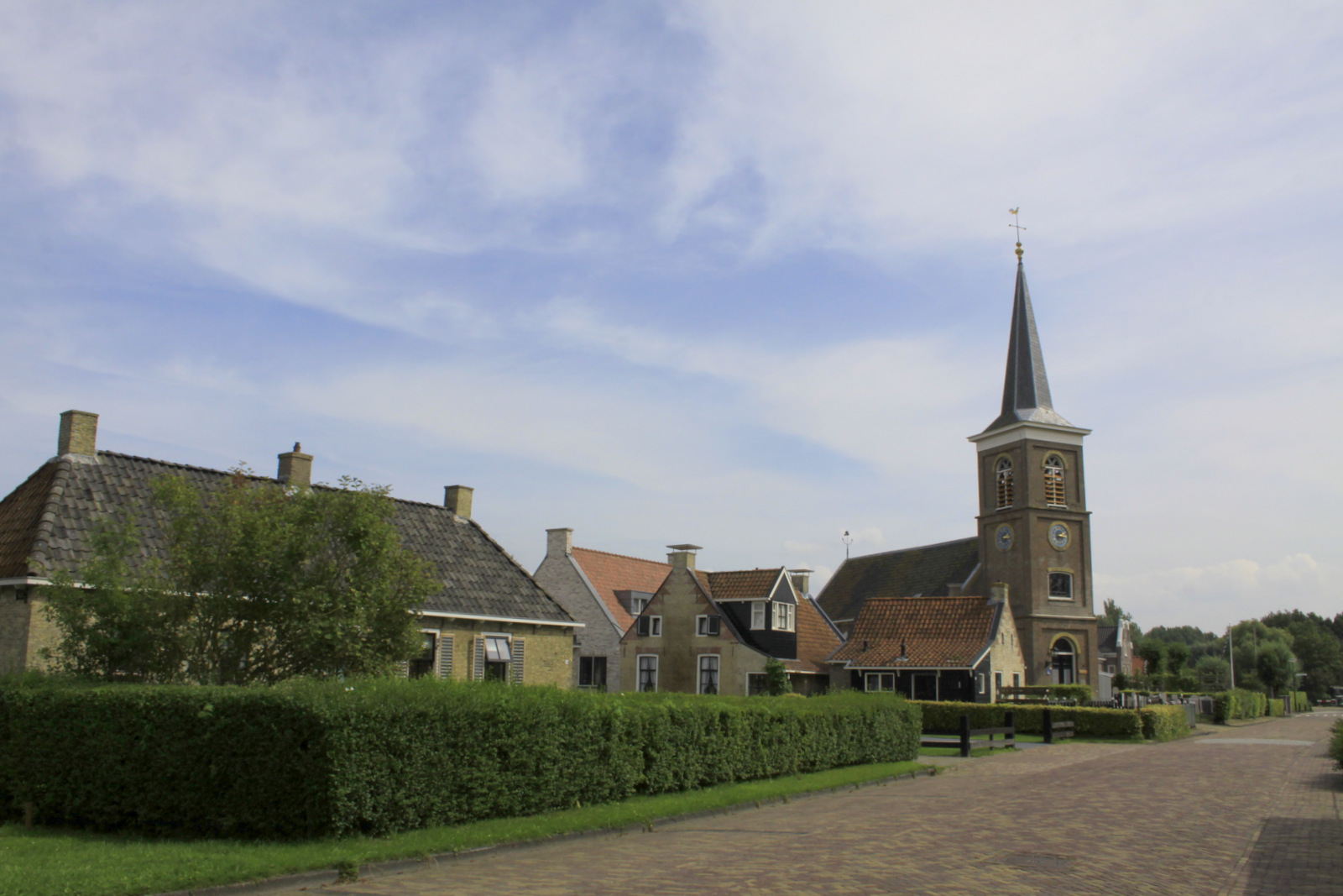 Uitwellingerga in de Gemeente Sûdwest-Fryslân. Friesland.